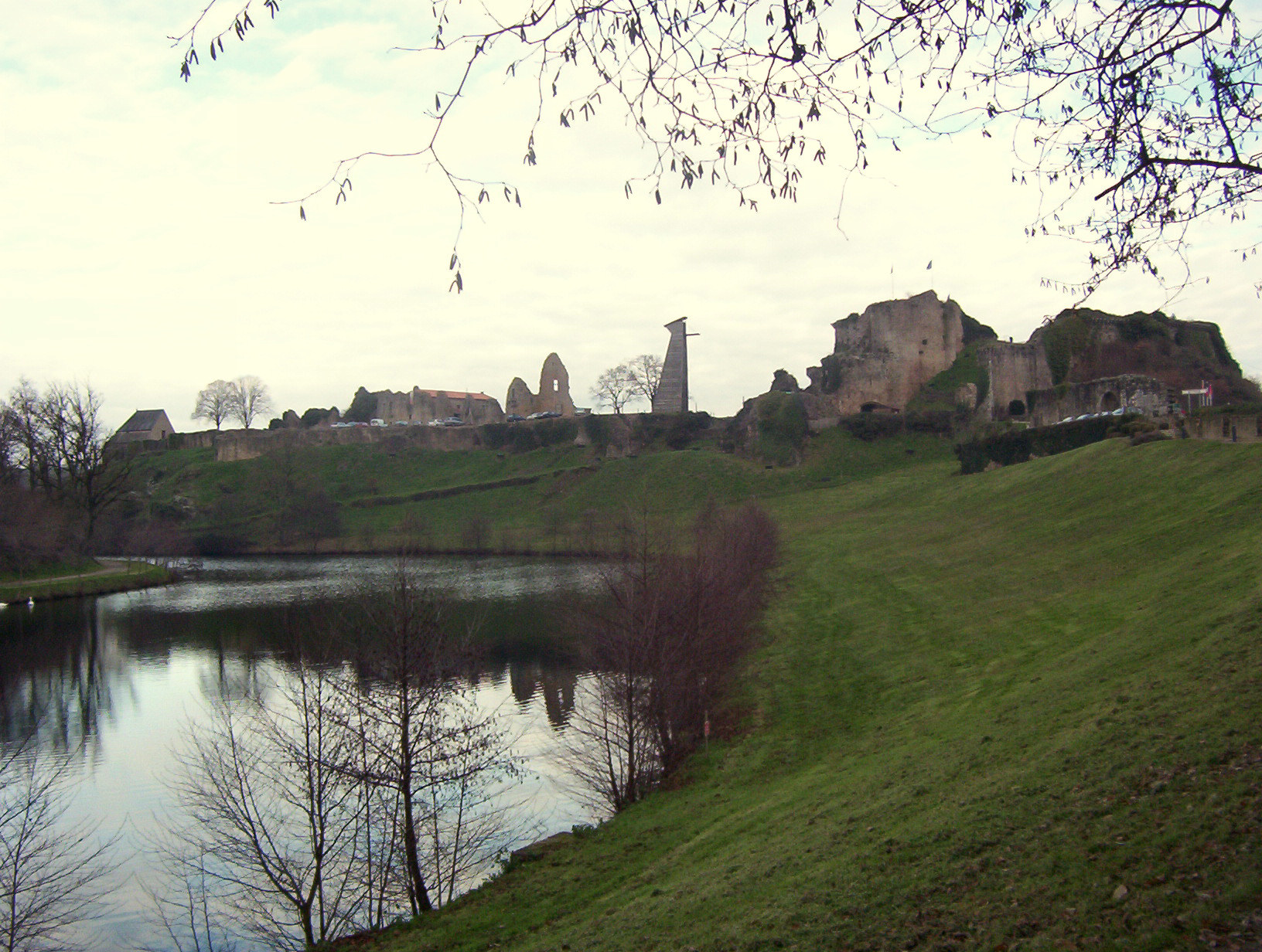 Le chateau de Tiffauges à l'automne 2005 prise depuis le chemin bordant la route départementale. On remarque sur la photo que le château est situé sur une butte le long de deux rivières (sur la photo la Crûme), la sèvre nantaise se situant de derrière le château vu de la route)